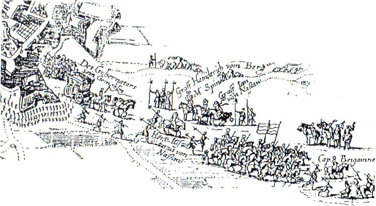 Beleg van Breda (1624-1625) Terugtocht uit Breda door het Bredase garnizoen na de capitulatie